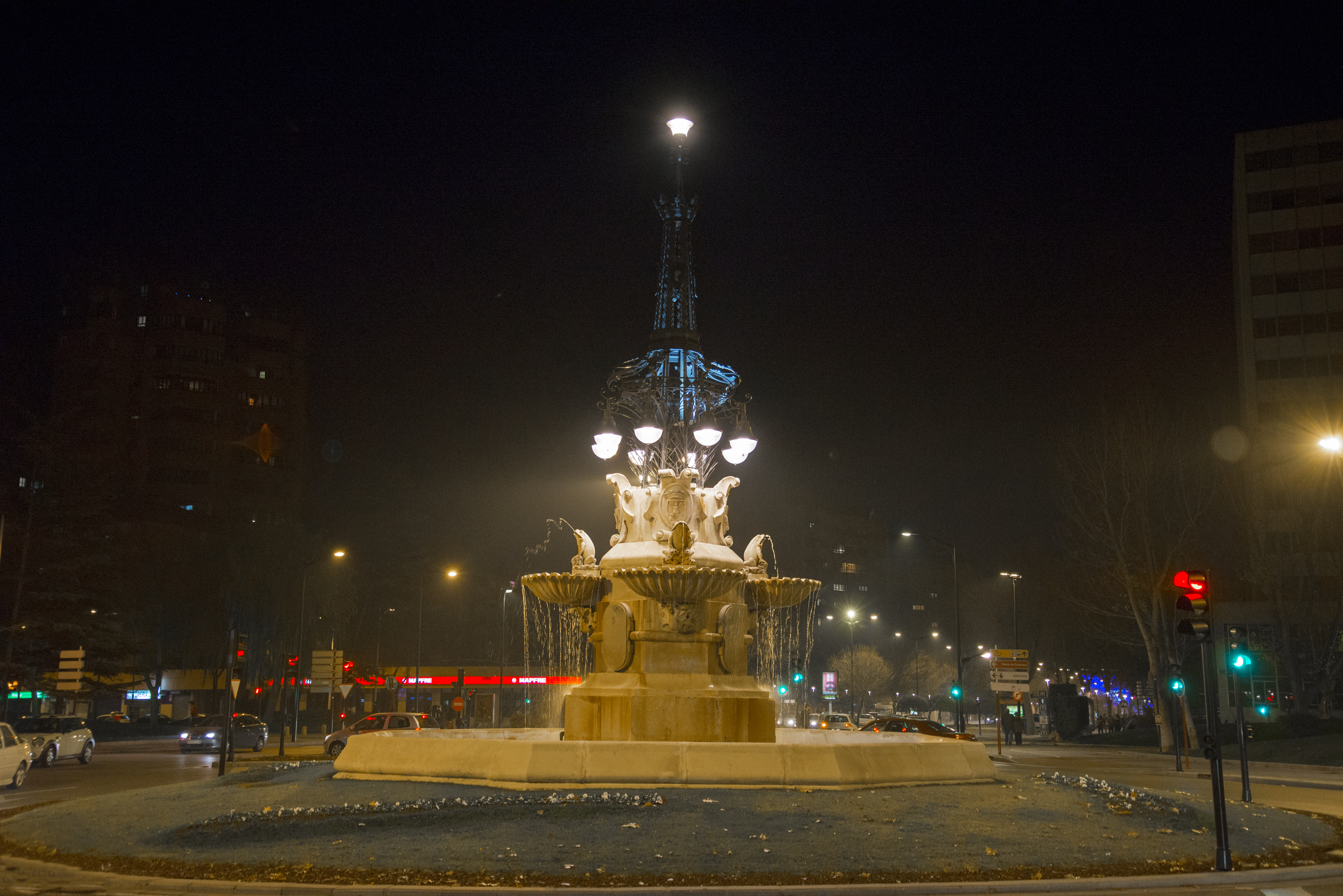 Albacete nocturno